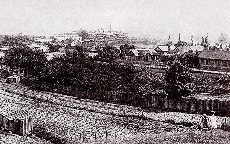 Беларуская (тарашкевіца): Менск (Miensk), Ляхаўка (Lachaŭka)